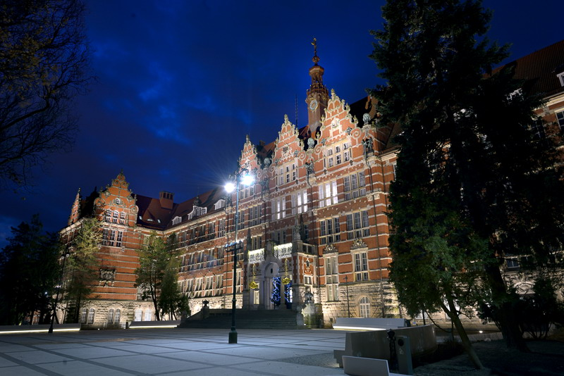 Politechnika Gdańska, Gmach Główny z odbudowaną w 2012 roku wieżą